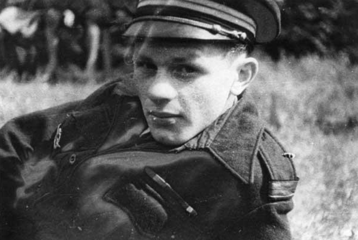 Roland Paulze d'Ivoy de La Poype, né le 28 juillet 1920 aux Pradeaux et mort le 23 octobre 2012 à Saint-Tropez, est un des pilotes de chasse français les plus fameux et héroïque de la Seconde Guerre mondiale.